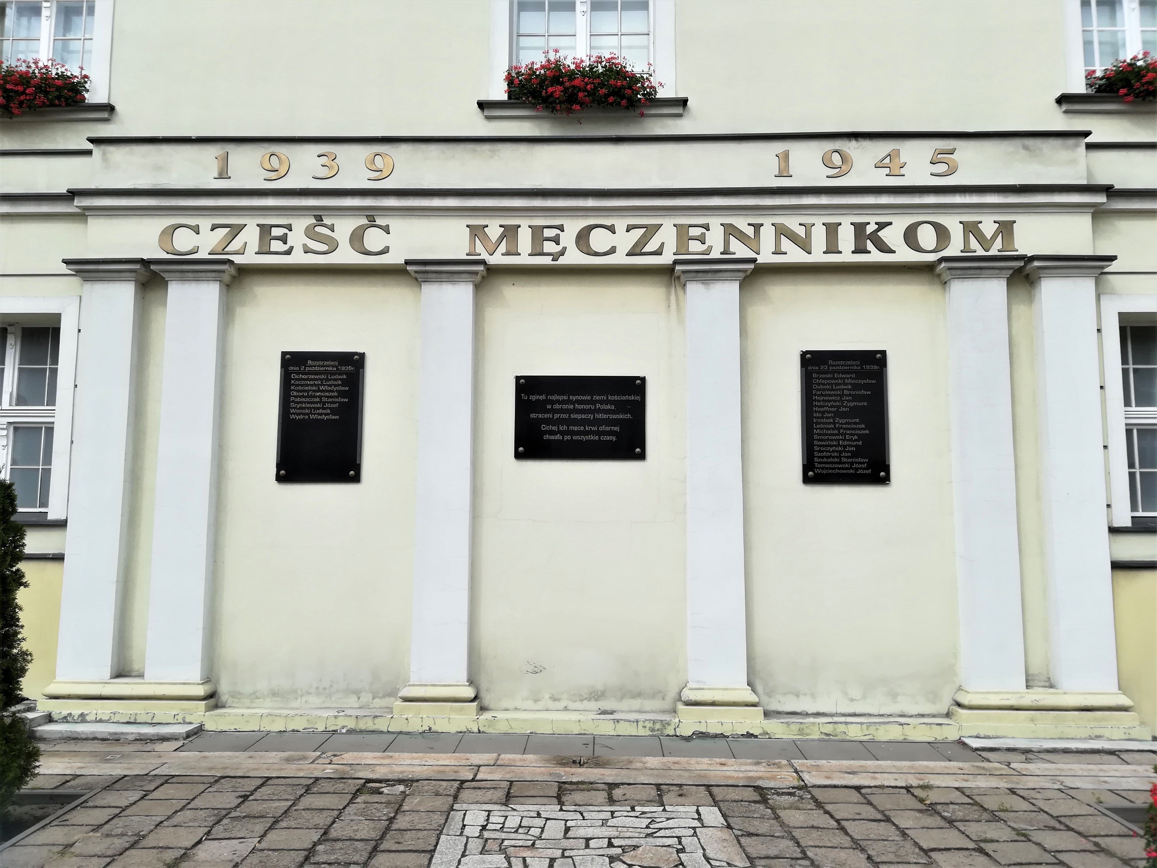 Ratusz w Kościanie.